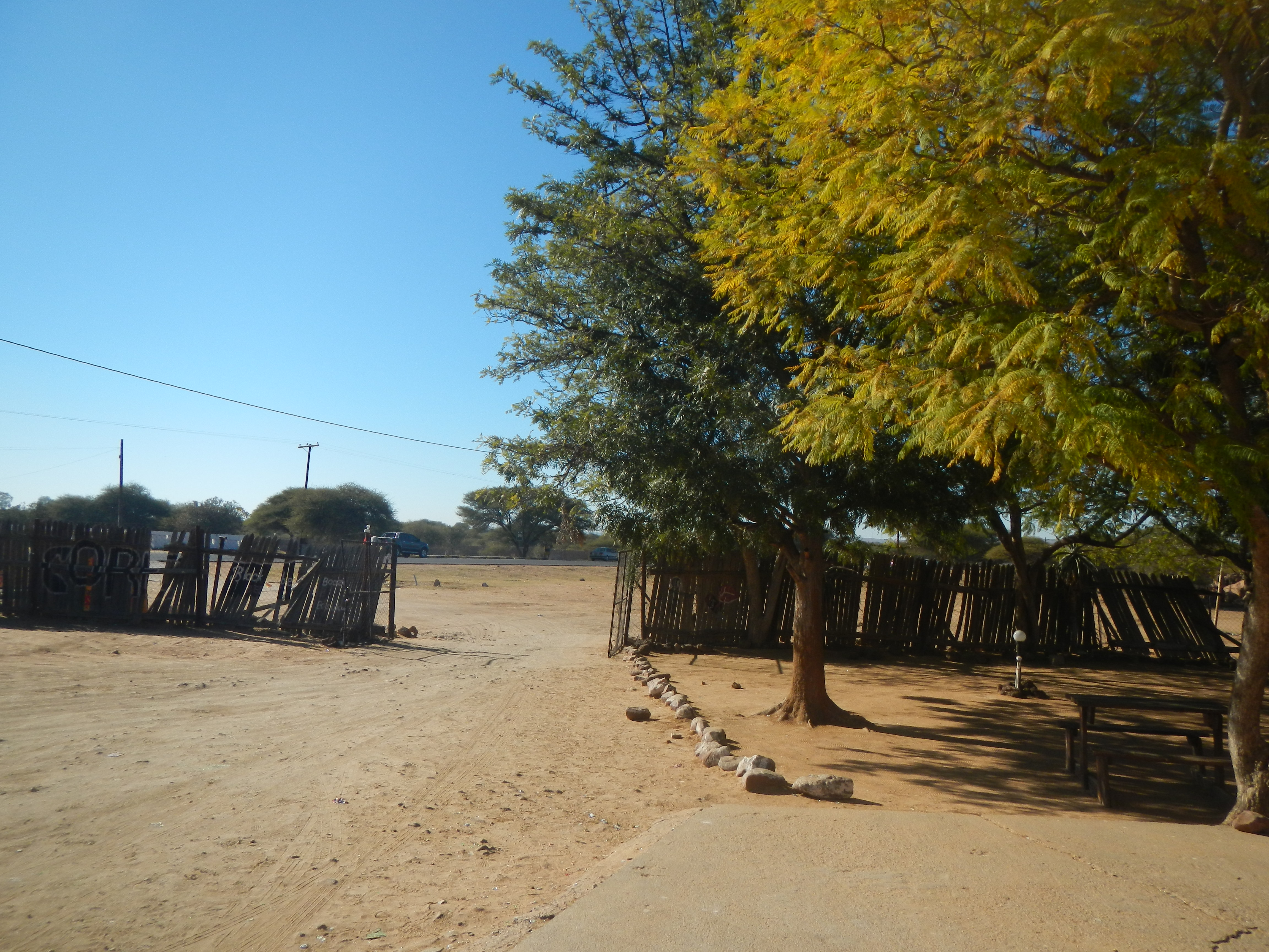 Thamaga, Botswana